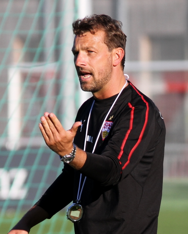 Markus Weinzierl bei seiner ersten Trainingseinheit beim VfB. Aufgenommen von